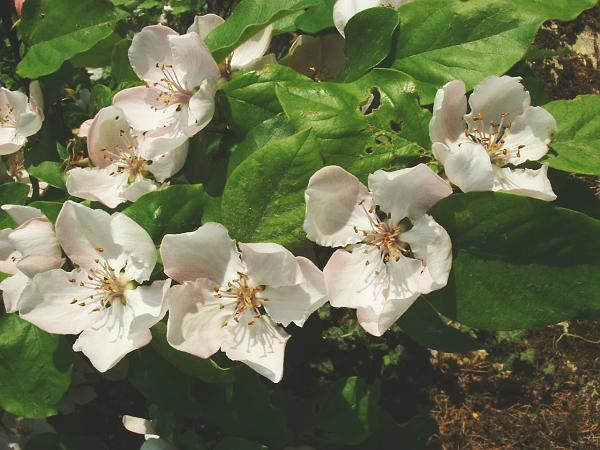 cognassier (fleurs), photo J.F.Gaffard, Gy, mai 2004.